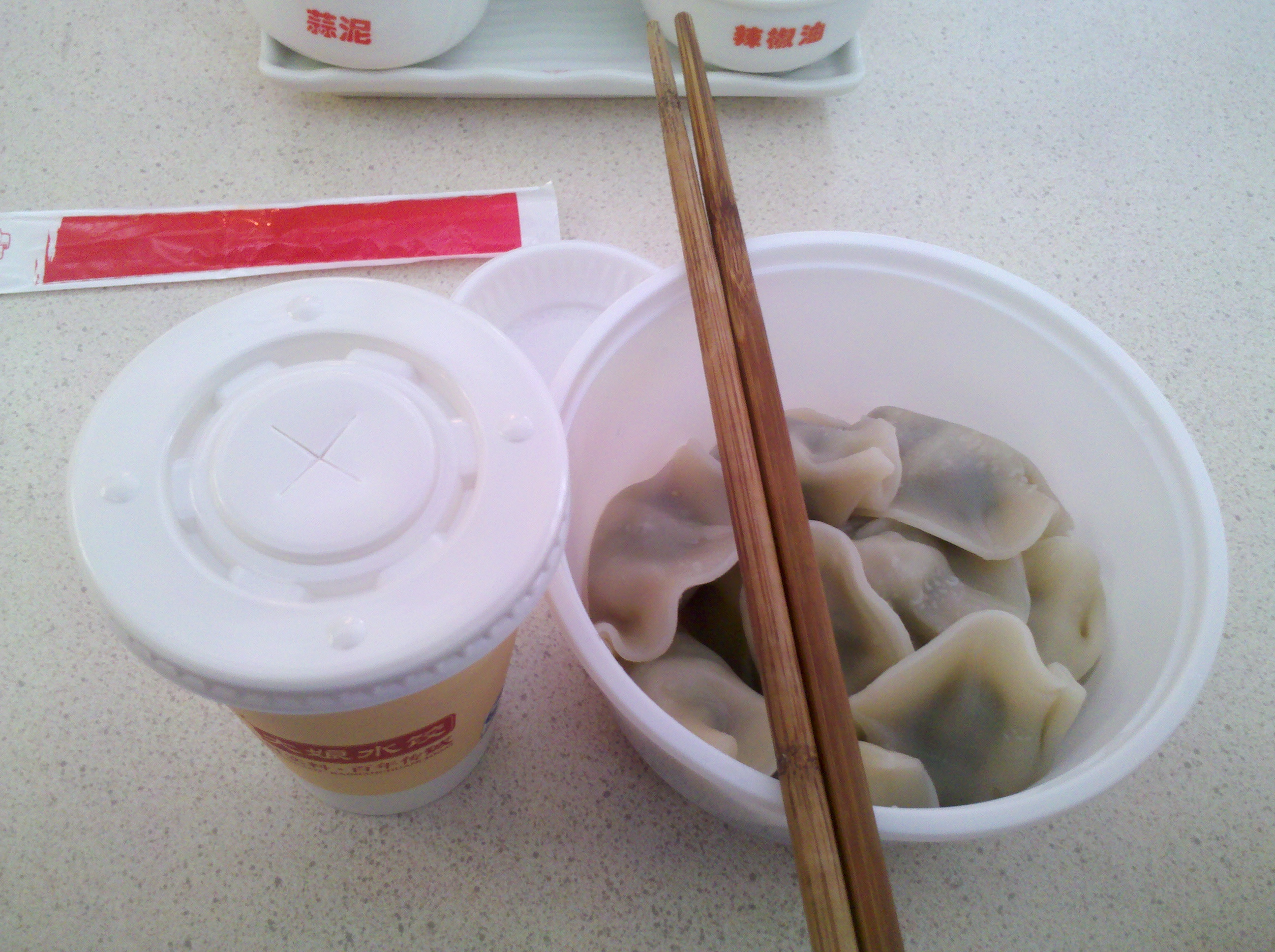 韭菜水饺（左）和豆浆（右纸杯内），在大娘水饺上海南站店摄。